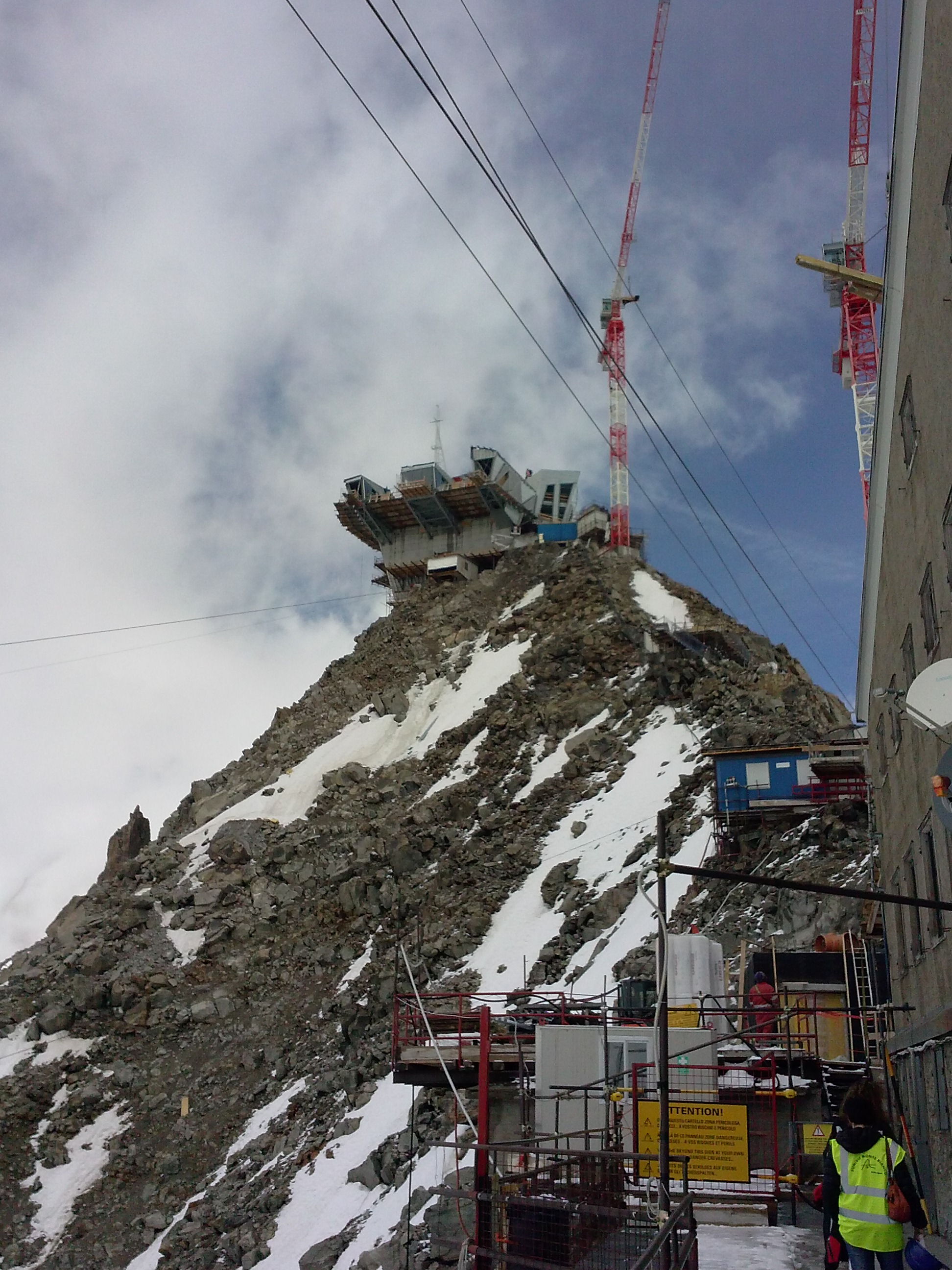 Il cantiere delle nuove funivie del Monte Bianco di Courmayeur. This is a photo of a monument which is part of cultural heritage of Italy.